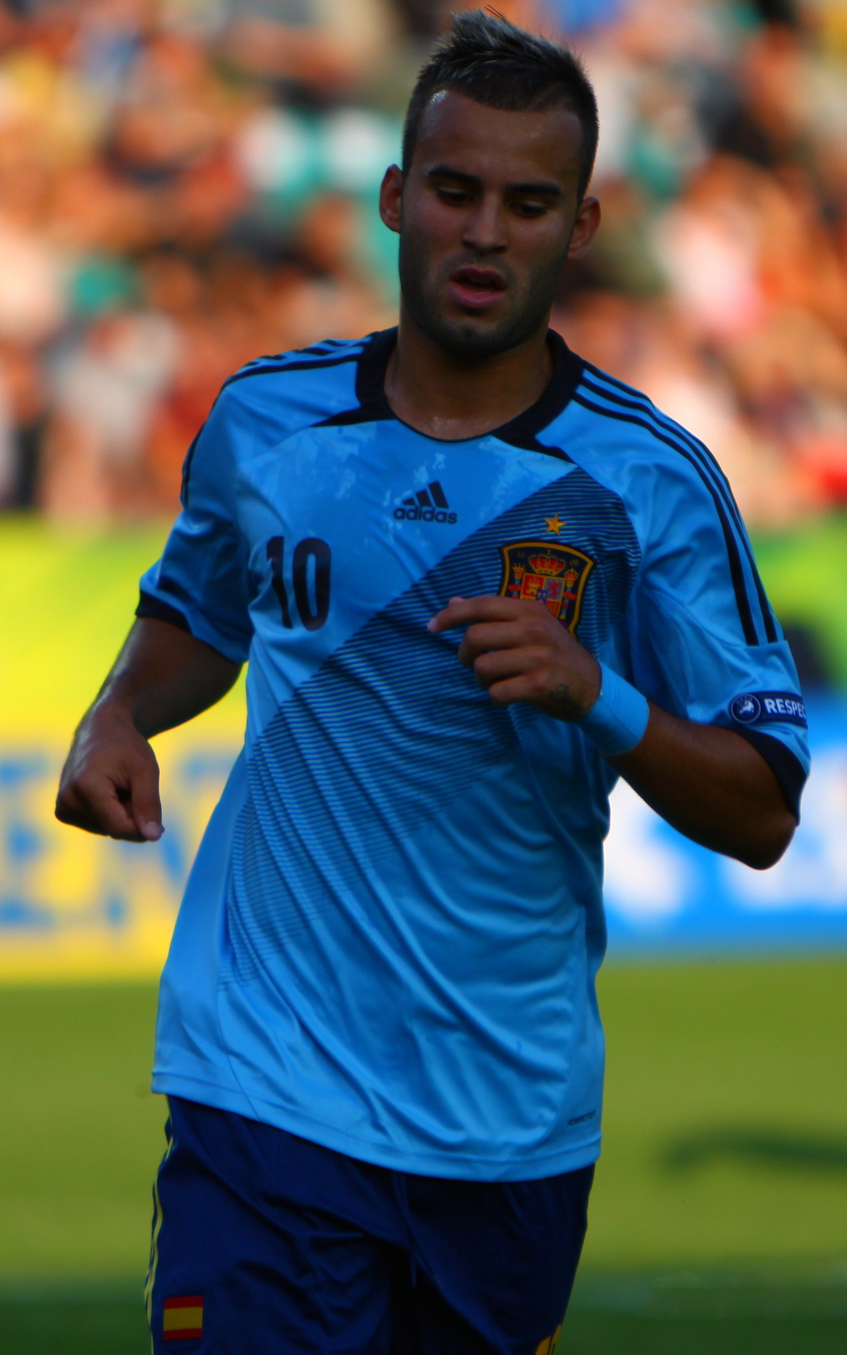 Jesé Rodríguez. Sub-19 Portugal vs España.